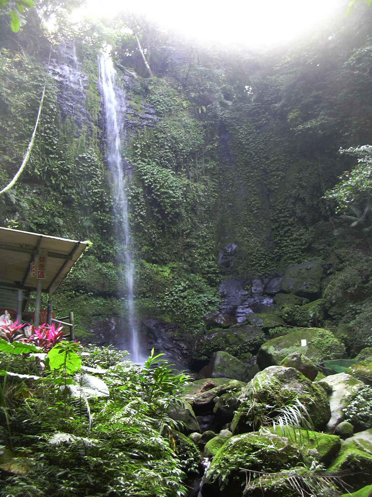 於步道上眺望炮子崙瀑布